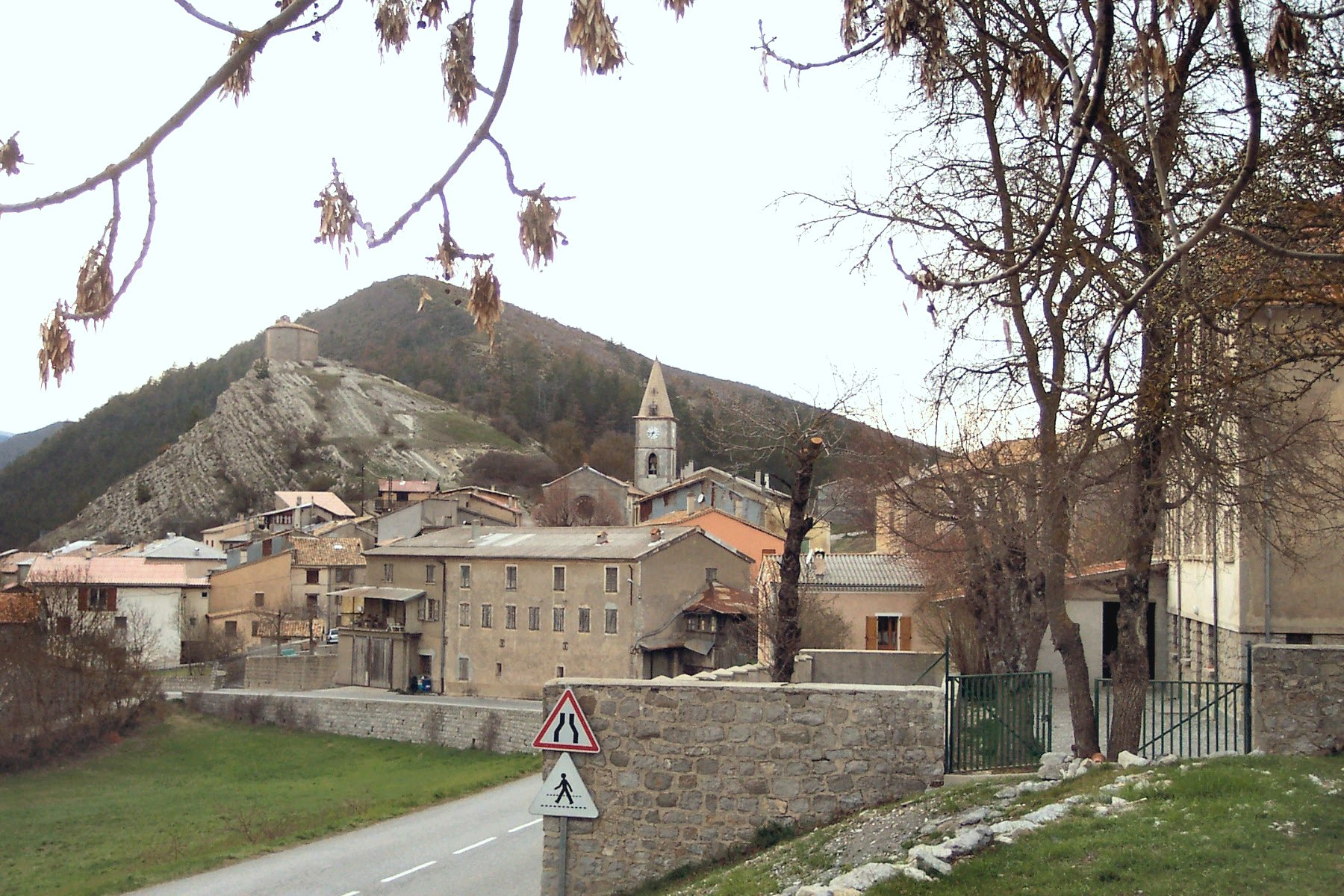 Vue du village, du bord de la route direction Digne (église paroissiale dans le village, chapelle Notre-Dame en arrière-plan).